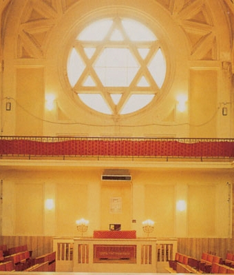 Interno della Sinagoga di Bologna.